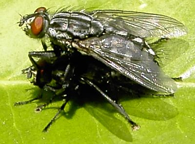 Sarcophaga carnaria mating.